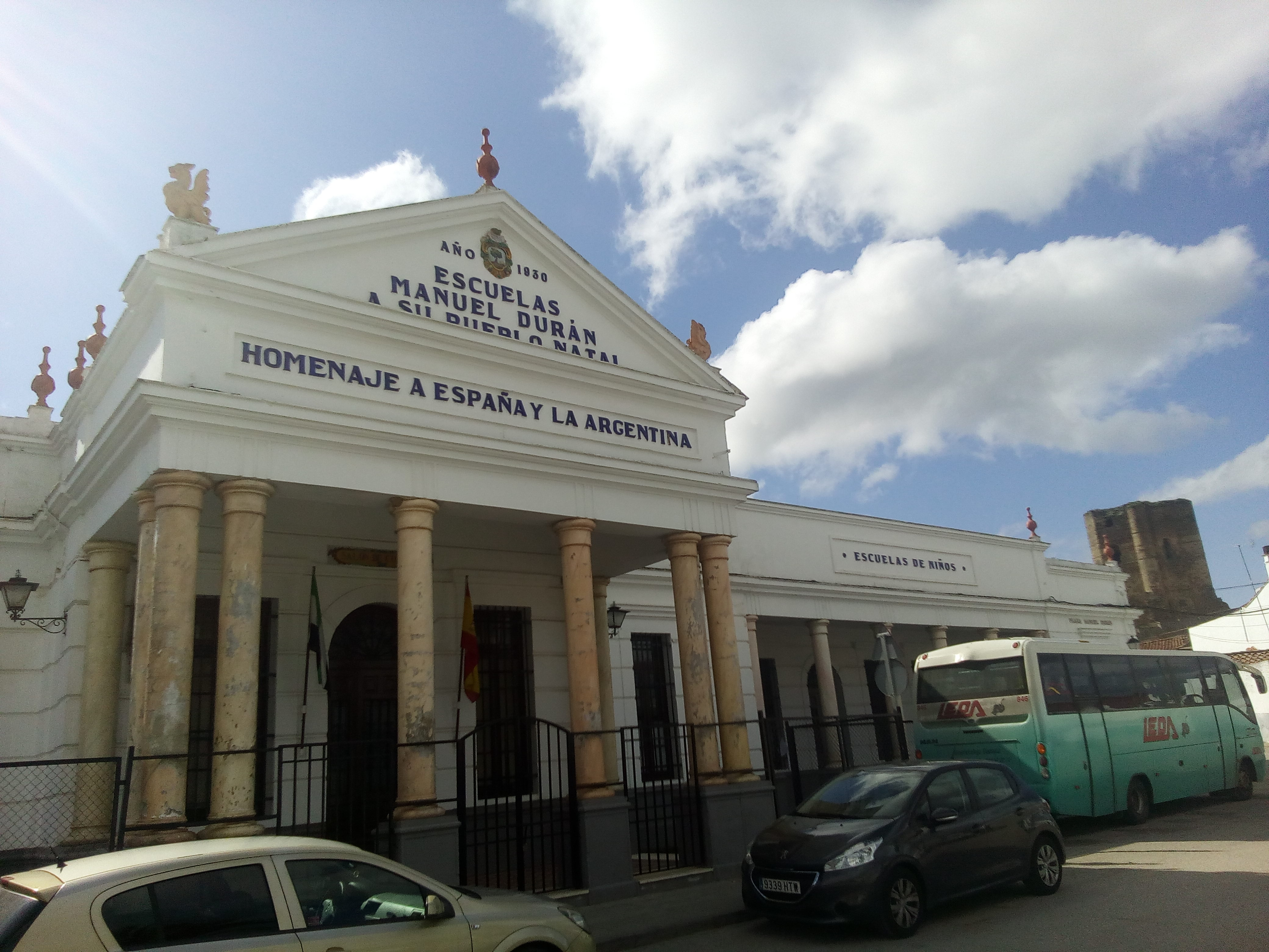 Escuela Publicas Manuel Duran